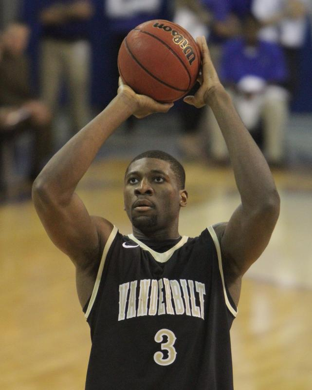 Festus Ezeli made Free Throw